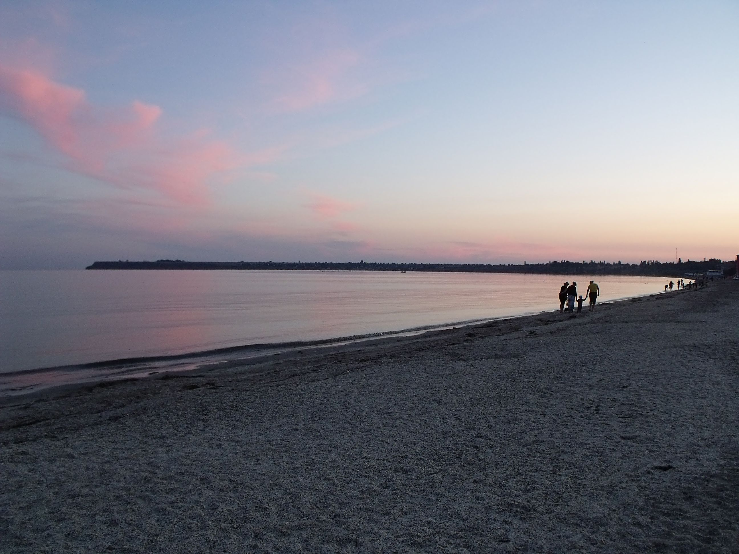 пляж ввечері в Рибаківці